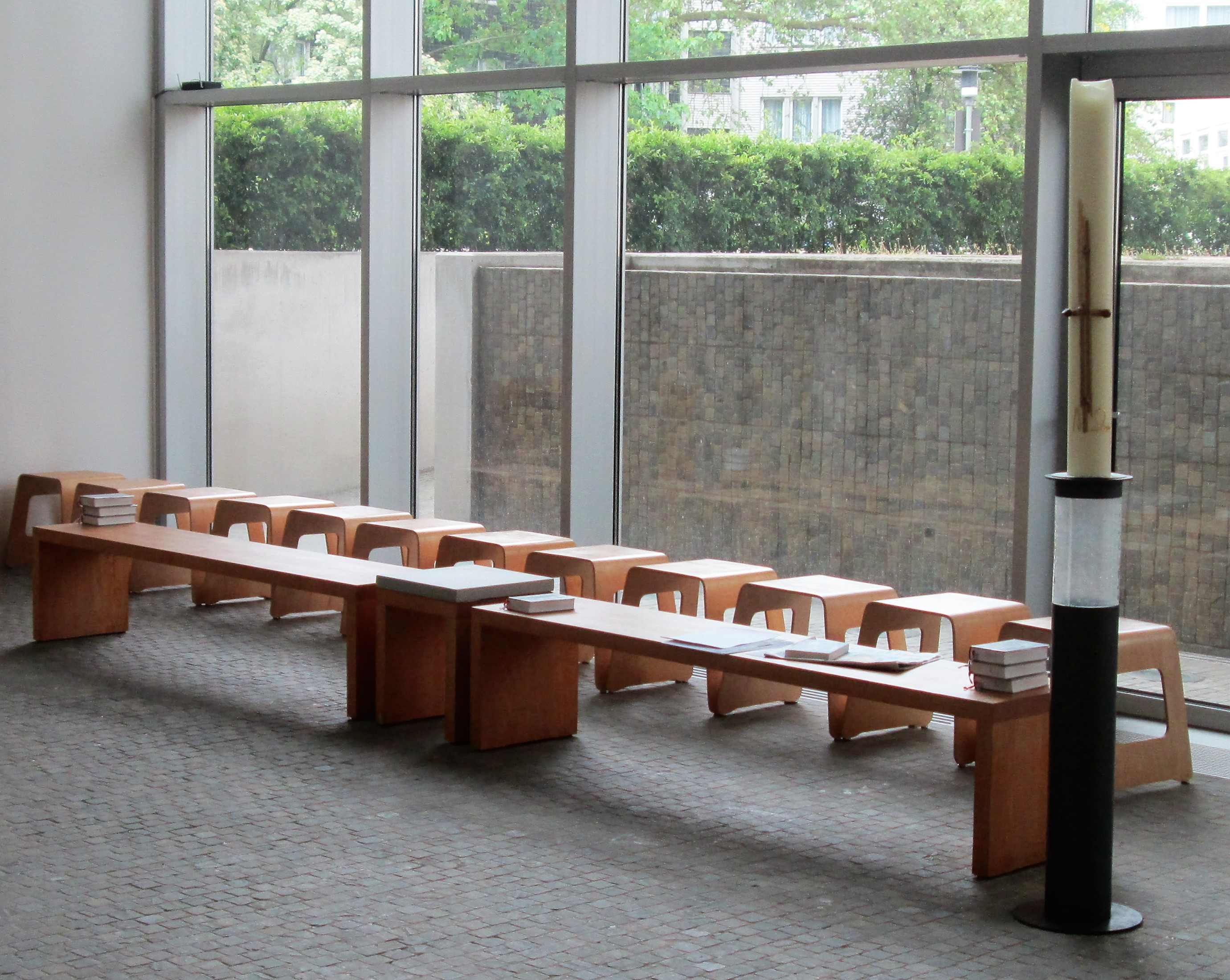 Inneres der St.-Canisius-Kirche (Berlin-Charlottenburg) - Sedilien